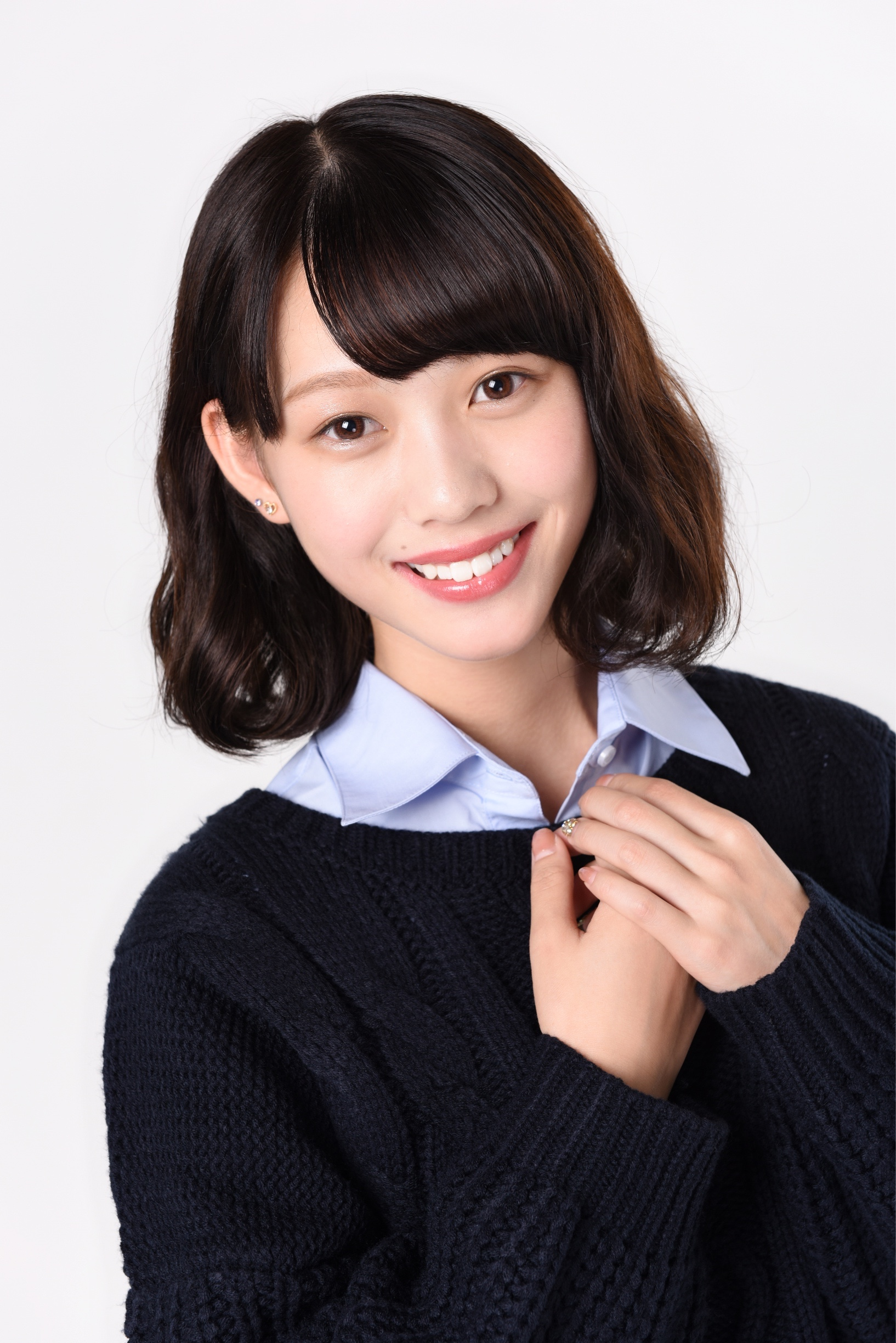 粕谷音本人、2020年1月写真スタジオにて撮影。